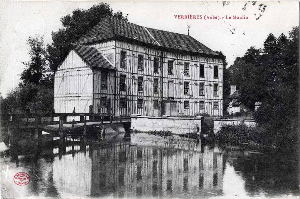 à verrières.